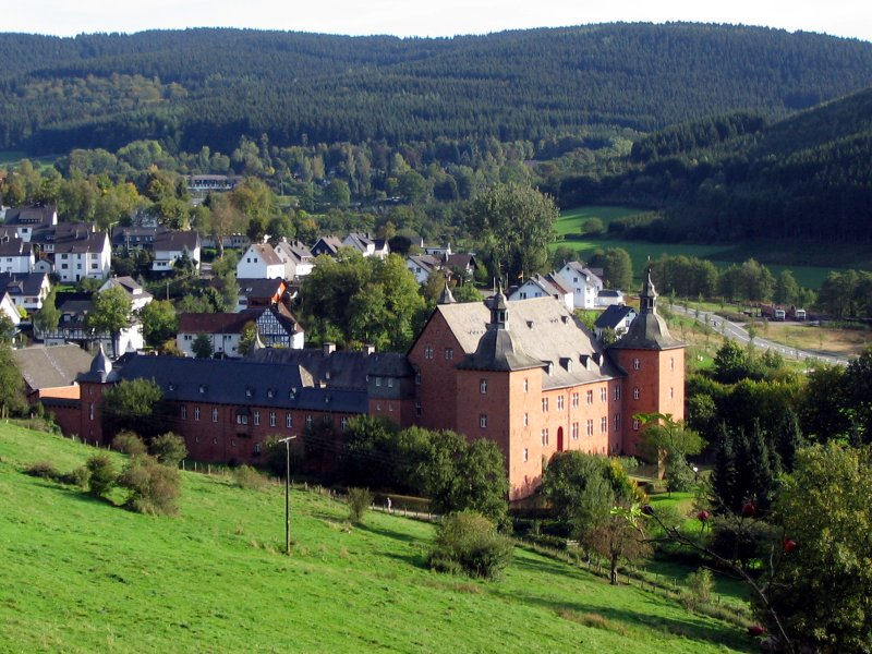 Schloss Adolfsburg bei Oberhundem in der Gemeinde Kirchhundem, NRW, Deutschland